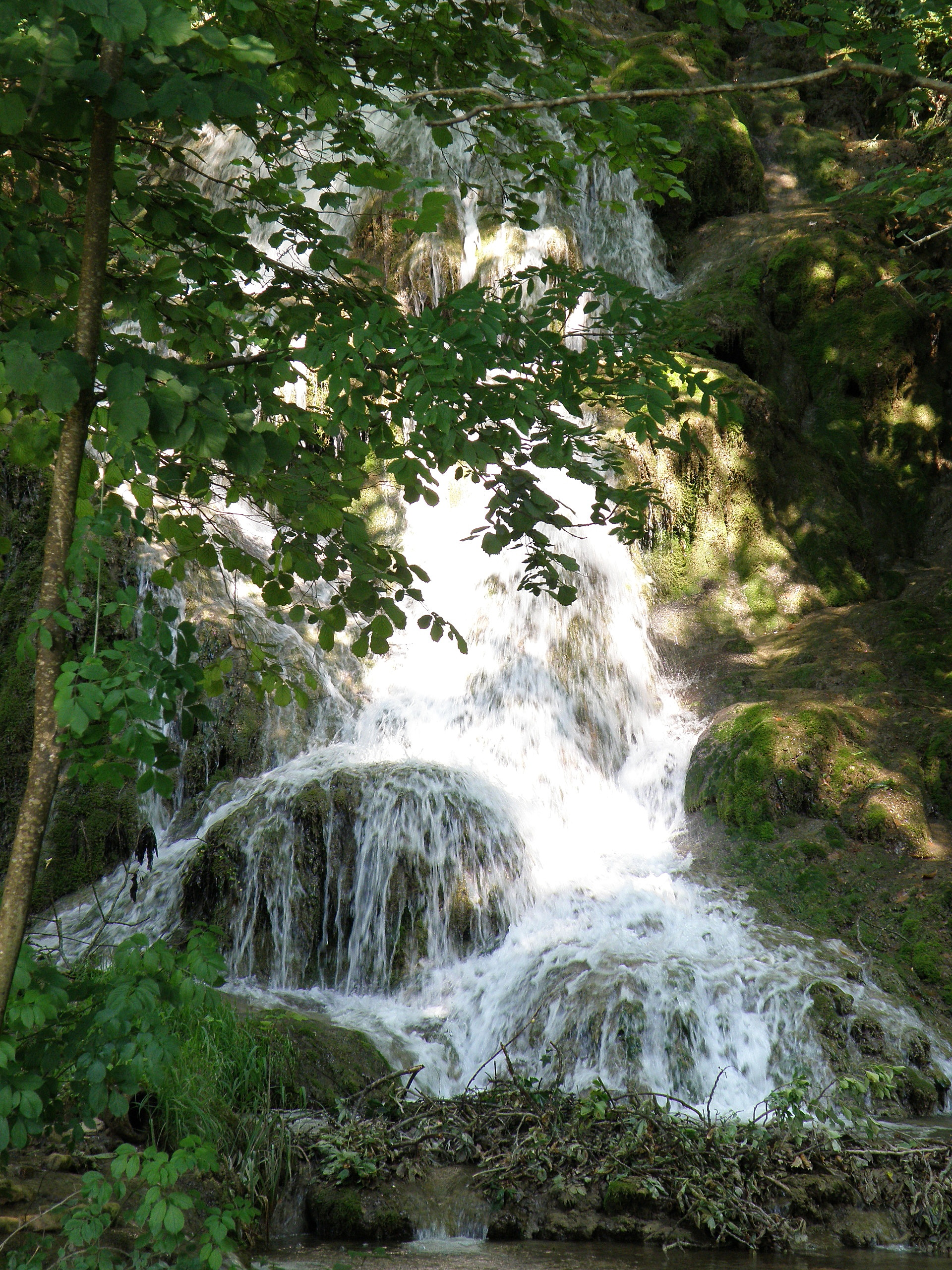 Lucey, comm. du département de la Savoie (région Rhônes-Alpes, France). Cascade près du château.